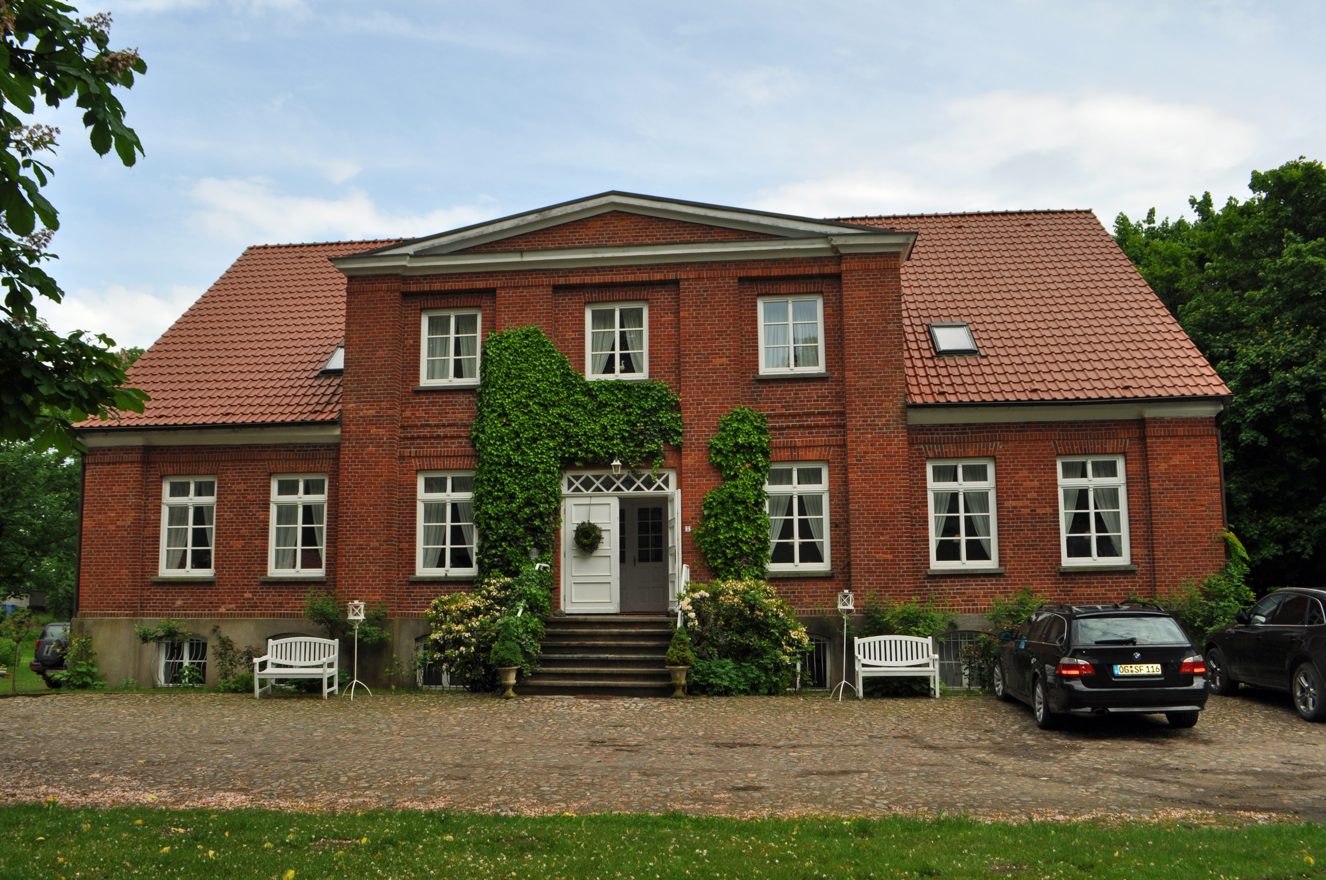 Gutshaus in Krimvitz (Putbus) auf Rügen im Juni 2013. Vorderansicht.